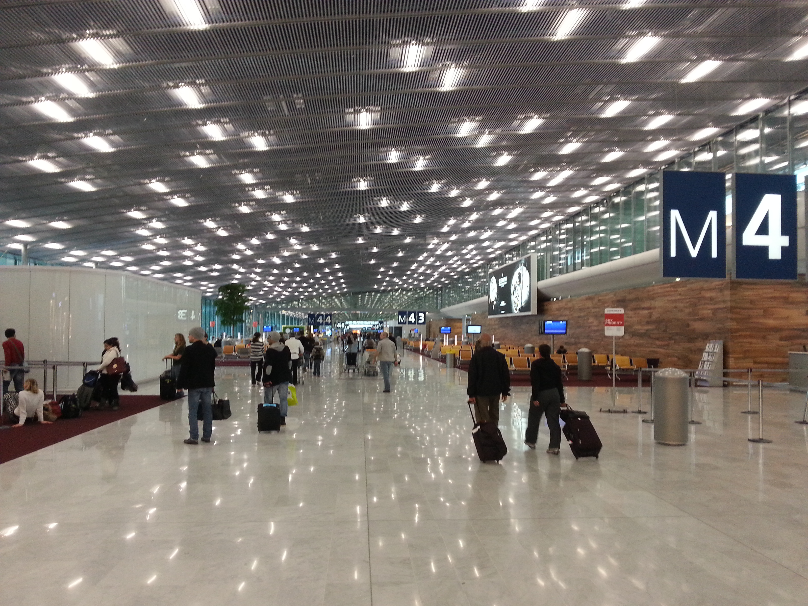 Couloir vers les portes d'embarquement du satellite 4 à CDG